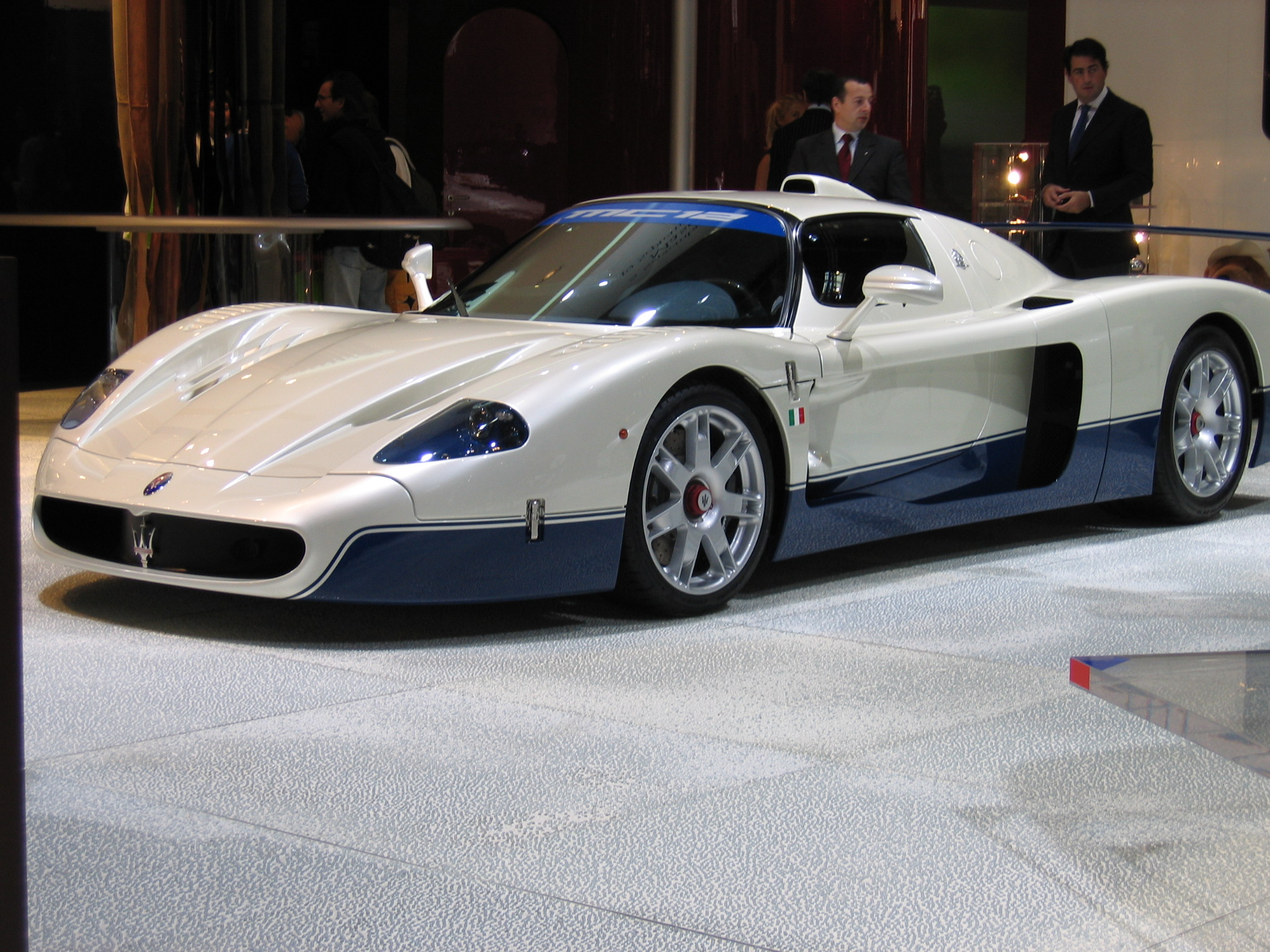 Maserati MC12 op het Parijse autosalon van 2004. Eigen werk, vrij voor het publiek. Categorie:Afbeelding auto